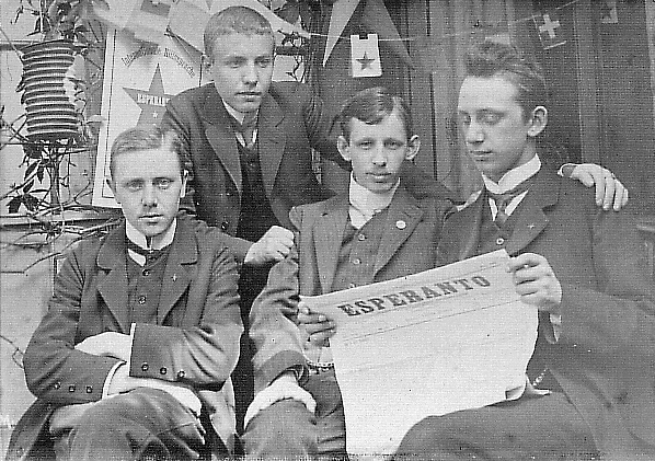 La kvarkapa prezidantaro de la Junulara Esperanto-Klubo en Münster (Monastero), Vestfalio en Germanio, fondita 1907-10-22.